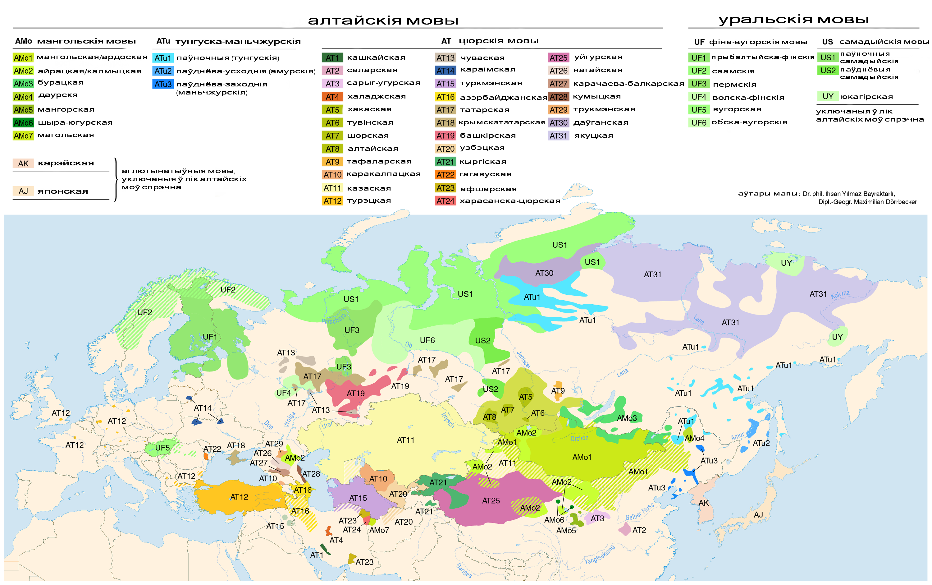 Распаўсюджаньне ўральскіх, алтайскіх і юкагірскіх моваў у Эўразіі